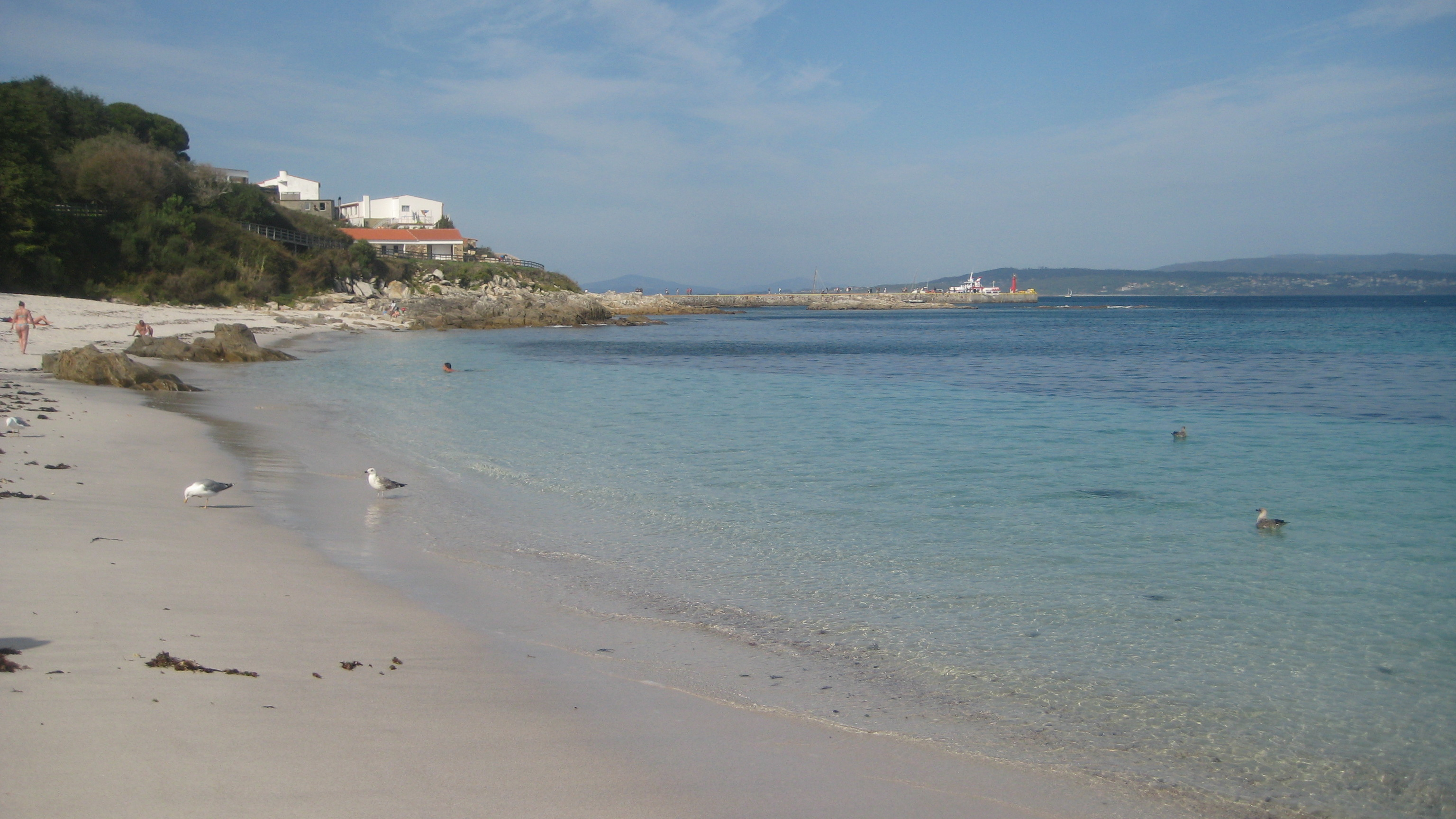 Praia na illa de Ons, Galicia, España.